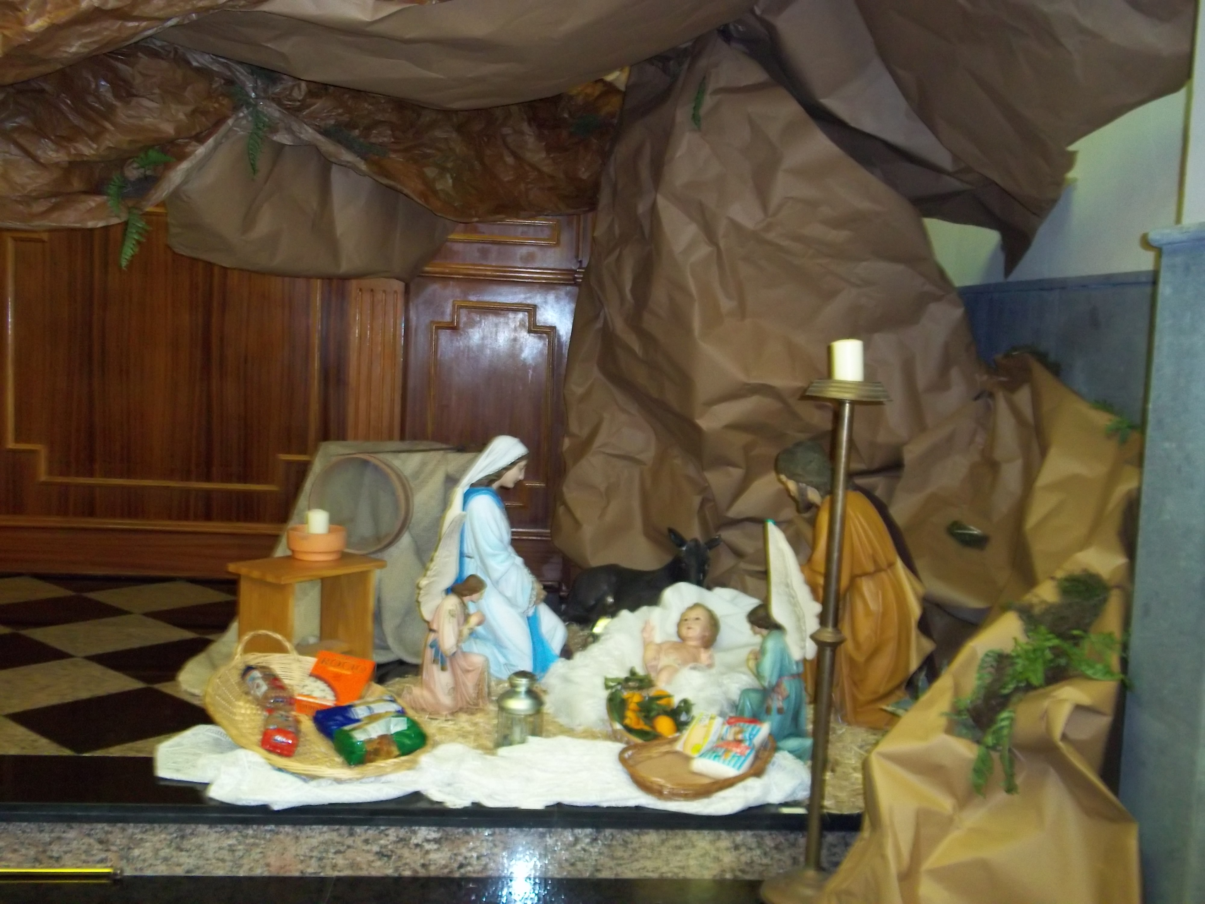 Cada año se realiza un belén diferente en la parroquia